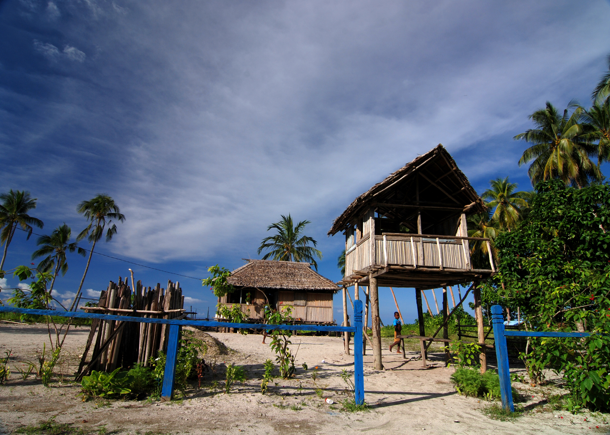 Rumah kayu suku Biak